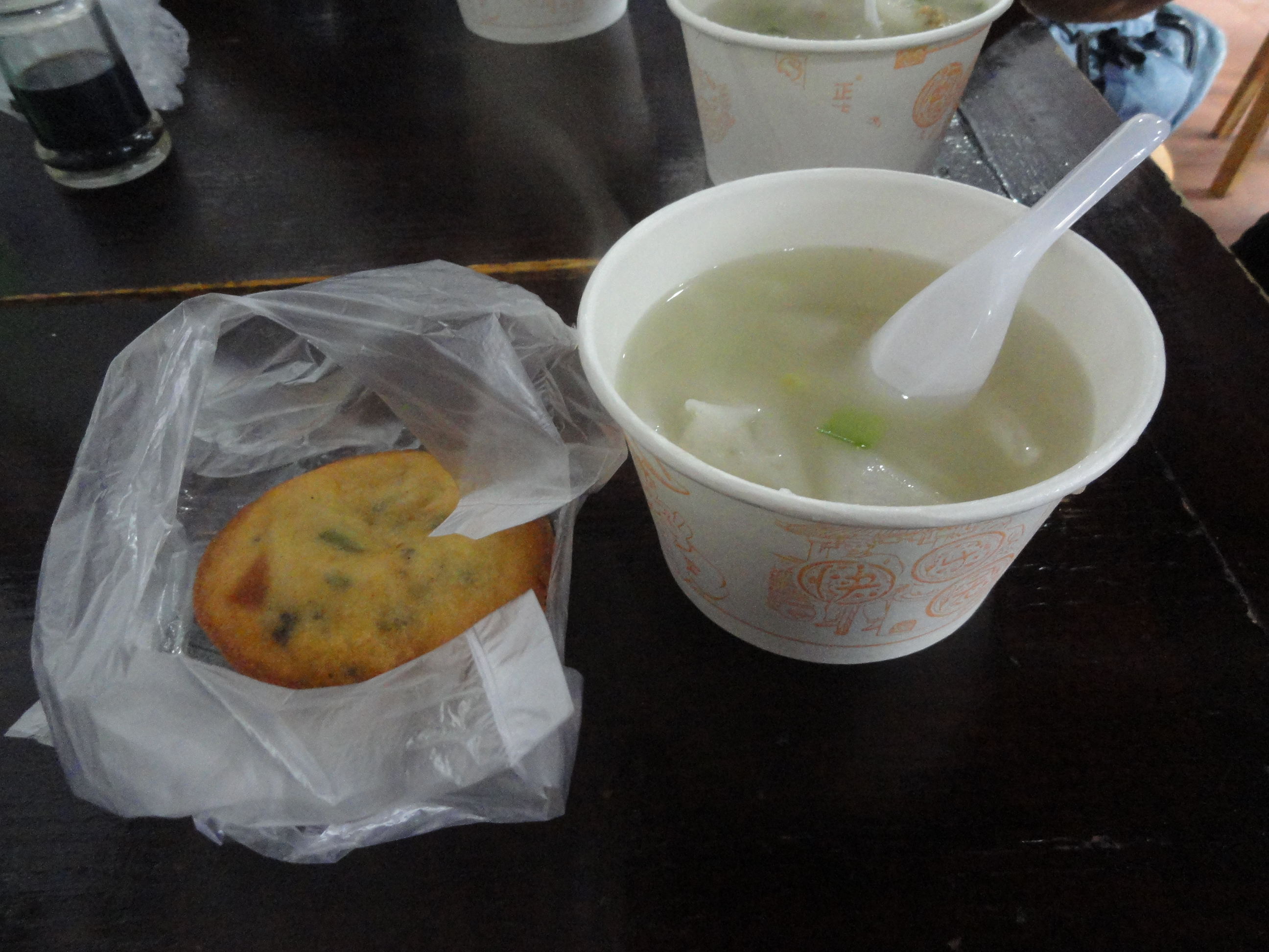 中文（中国大陆）: 福州三坊七巷某店的鼎边糊